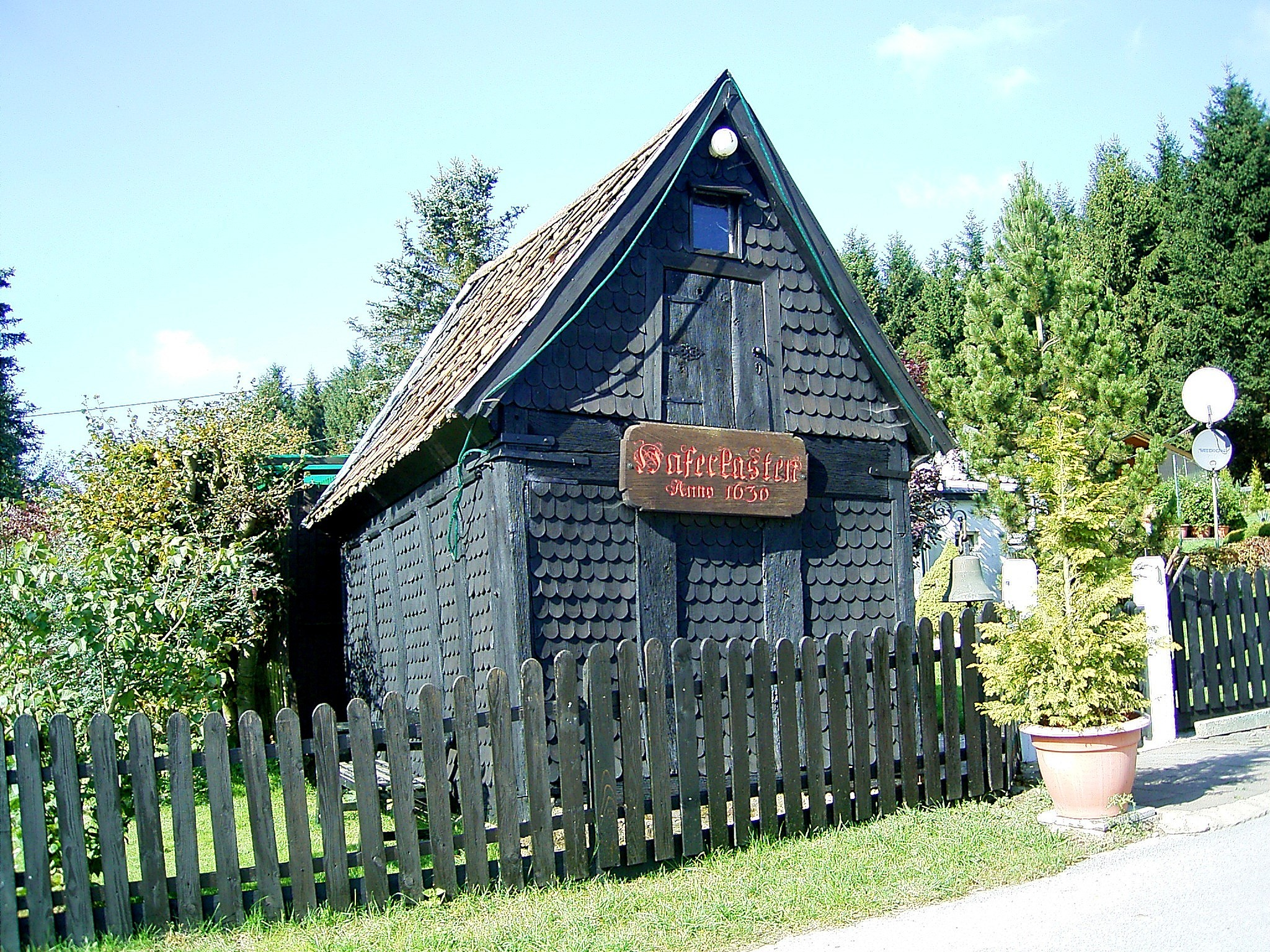 Radevormwald